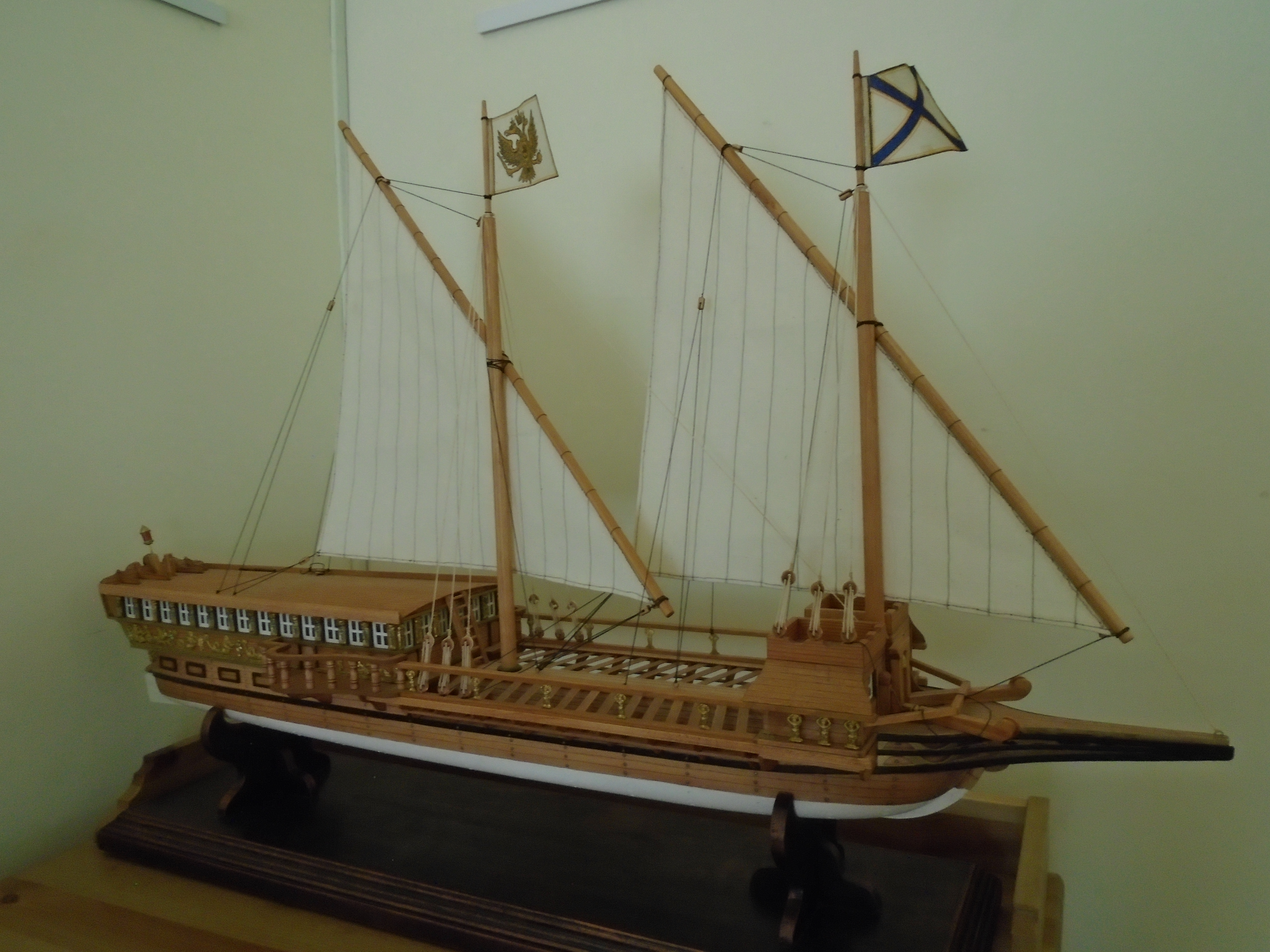 Галера «Тверь», на которой в 1767 году Екатерина II приехала в Казань.